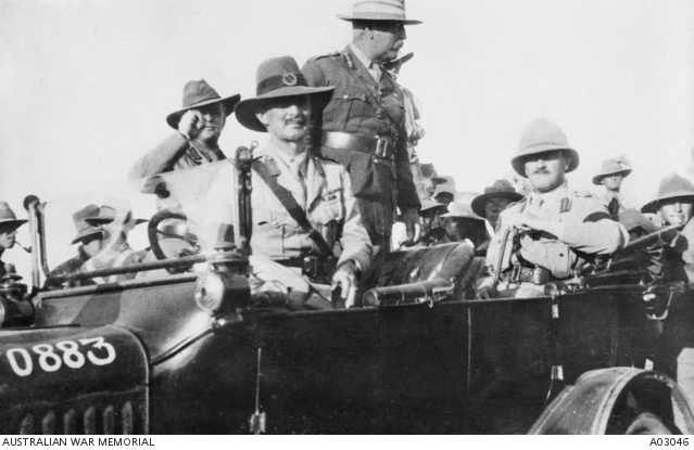 מפקדי צבא בריטים במצרים: משמאל לימין: לוטננט פאונס, מייג'ור ג'נרל אדוארד צ'ייטור, בריגדיר ג'נרל ריירי וגנרל אלנבי